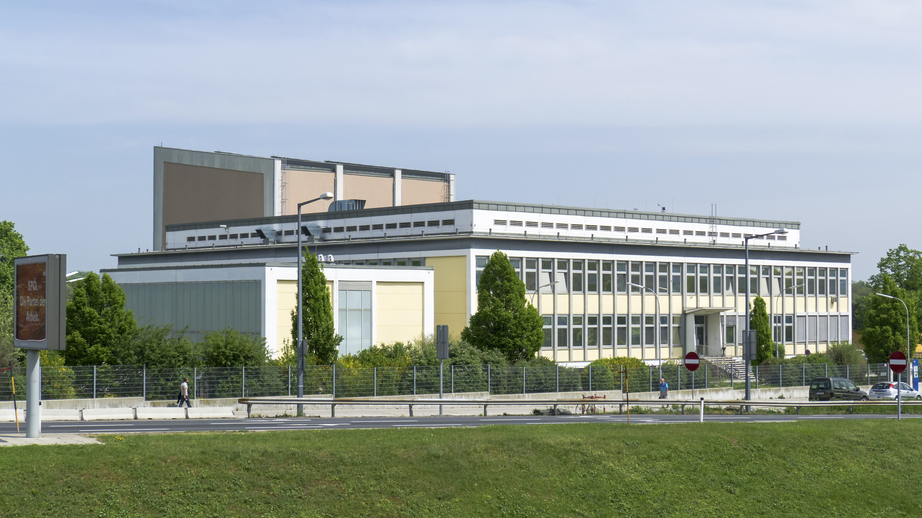 Atominstitut der TU Wien (Praterreaktor) in Wien 2